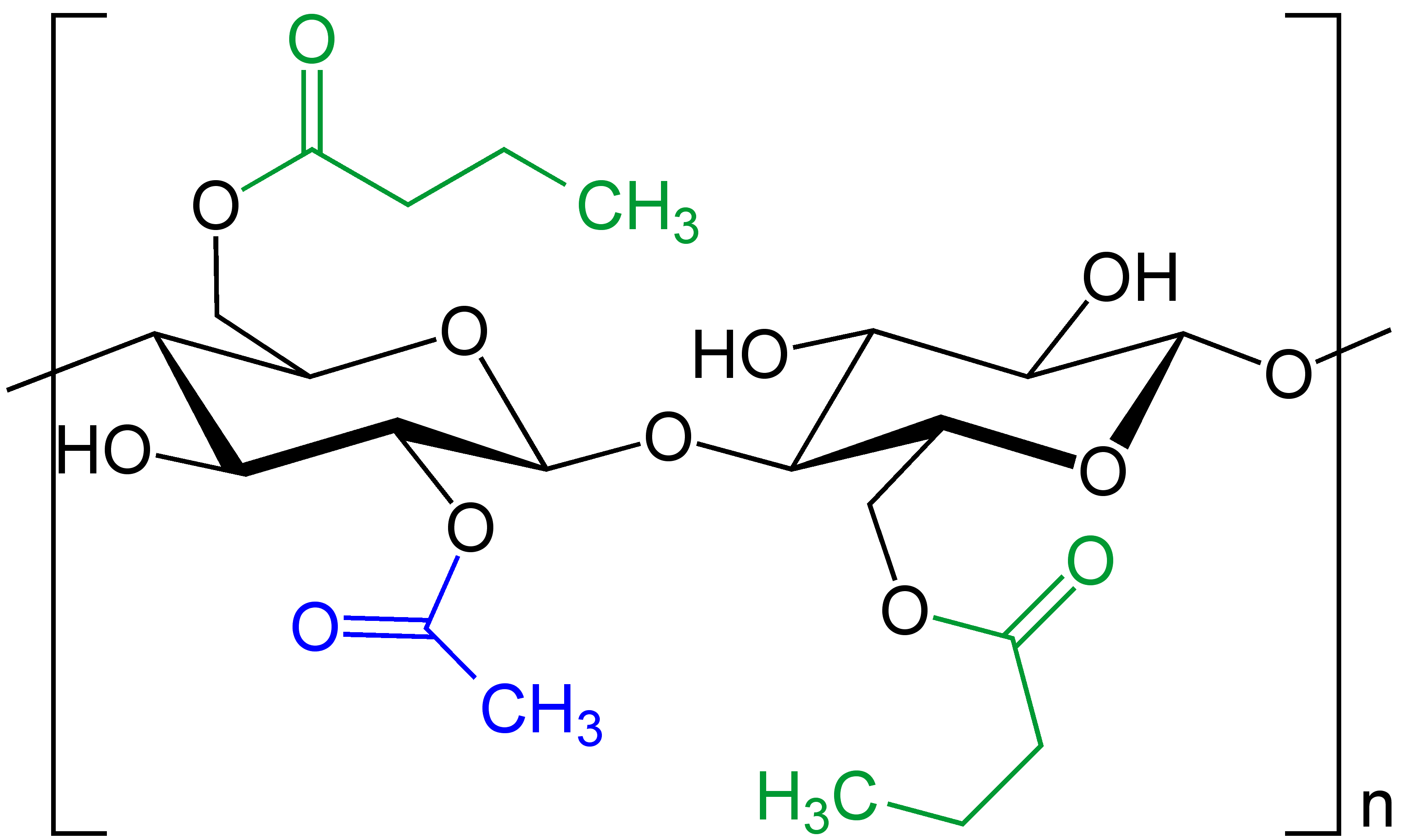 Celluloseacetobutyrat_SCHEMATIC_Structural_Formula